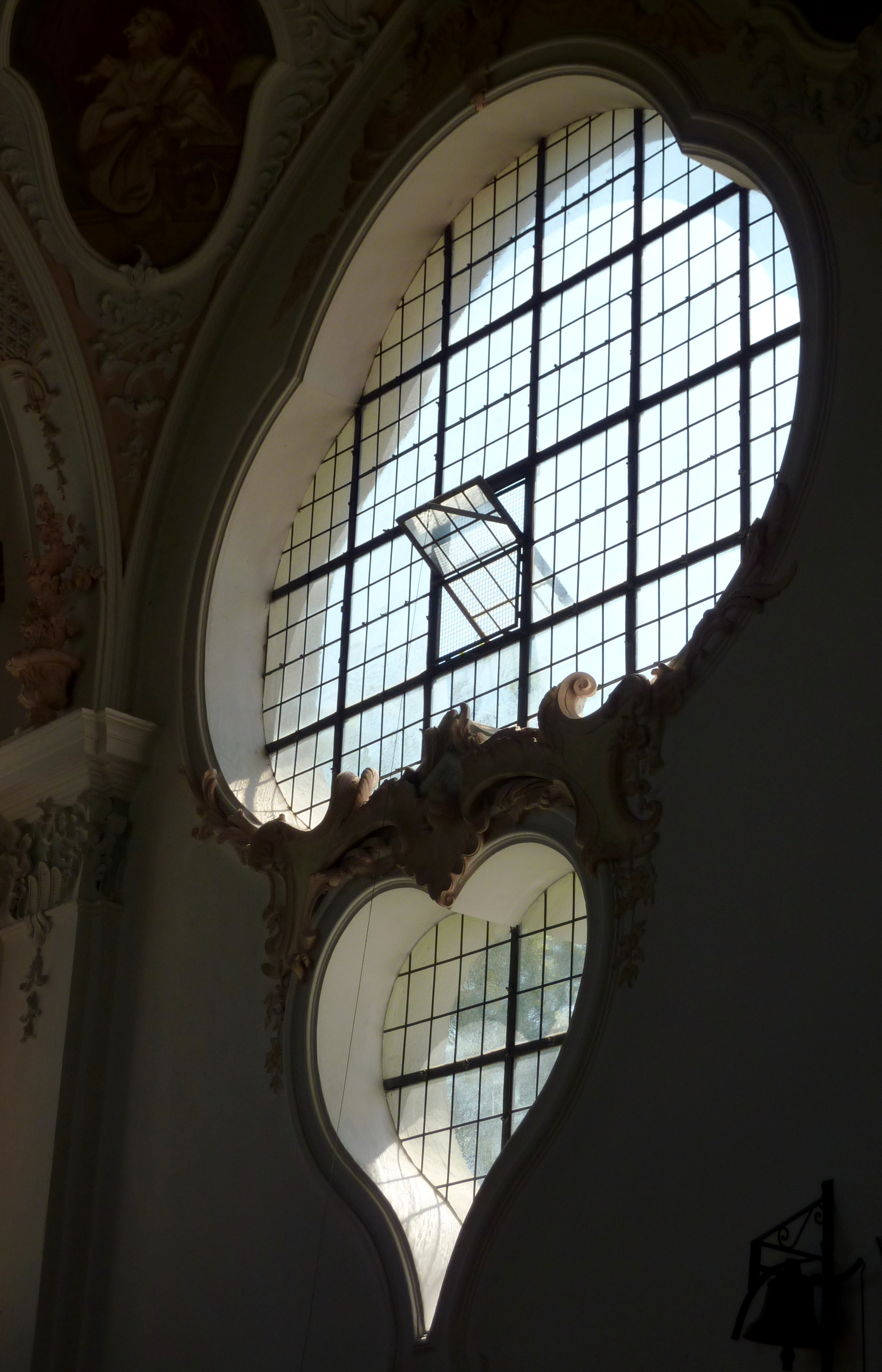 Katholische Pfarrkirche St. Georg in Westendorf, einer Gemeinde im Landkreis Augsburg (Bayern), Dreipass- und herzförmiges Fenster im Chor